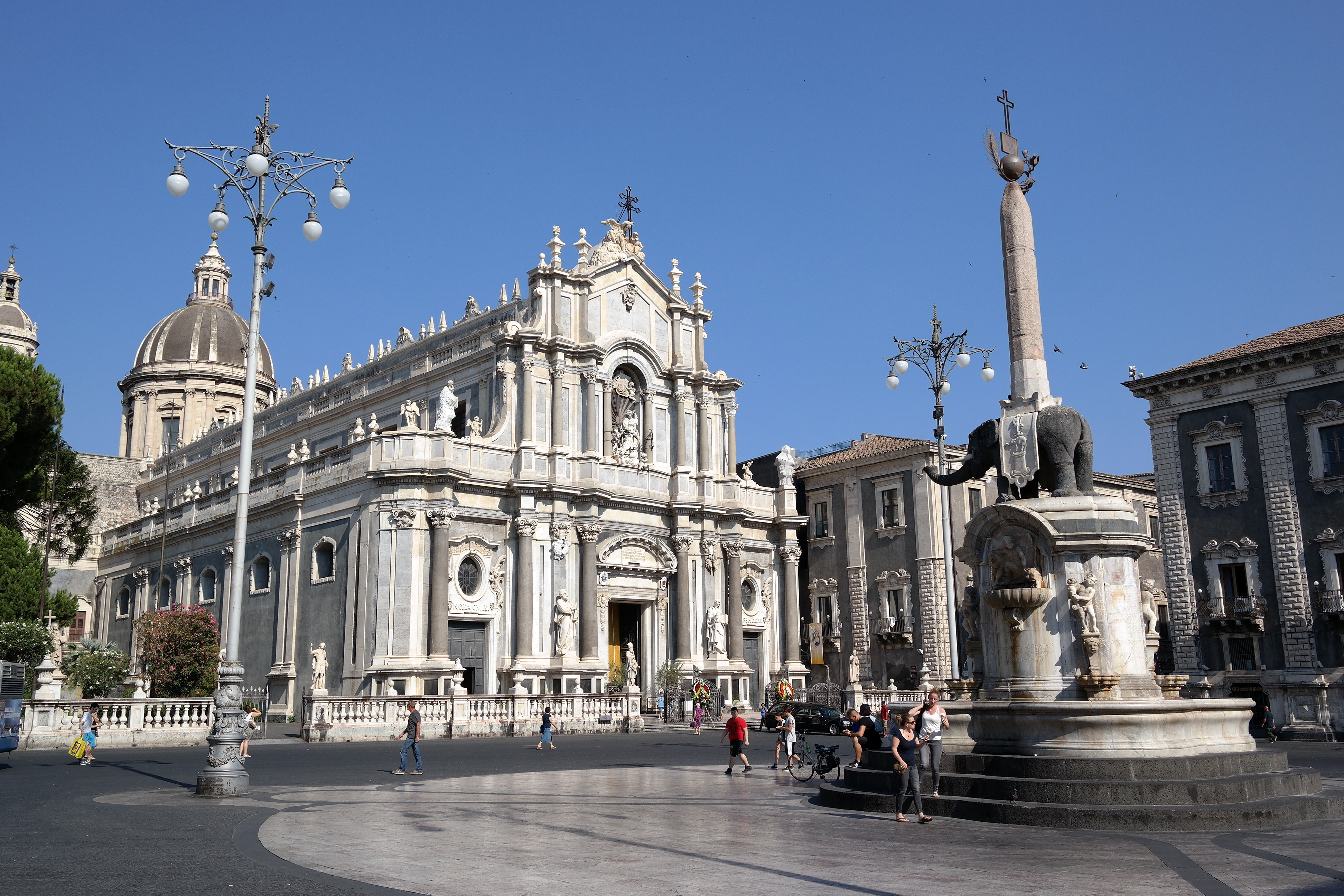 Piazza del Duomo a Catania